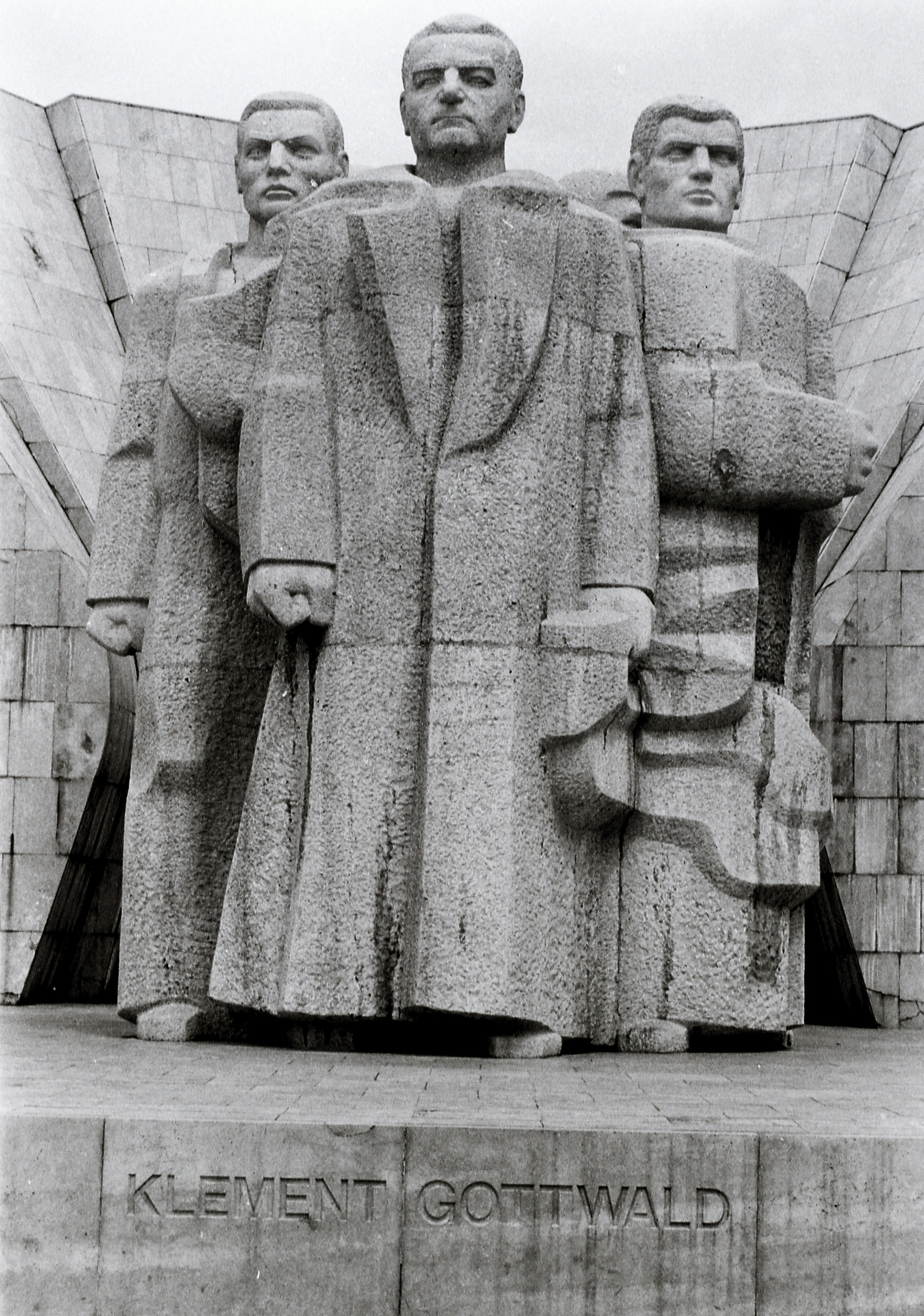 Pamätník K. Gottwalda v Bratislave, 1980. Kameň, výška 680cm.